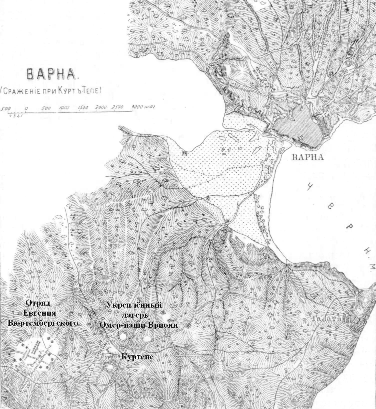 Сражение при Куртепе 18 сентября 1828 года. Иллюстрация статьи П. М. Андрианов. Русско-Турецкая война 1828–1829 гг. в сборнике «История русской армии от зарождения Руси до войны 1812 г.»